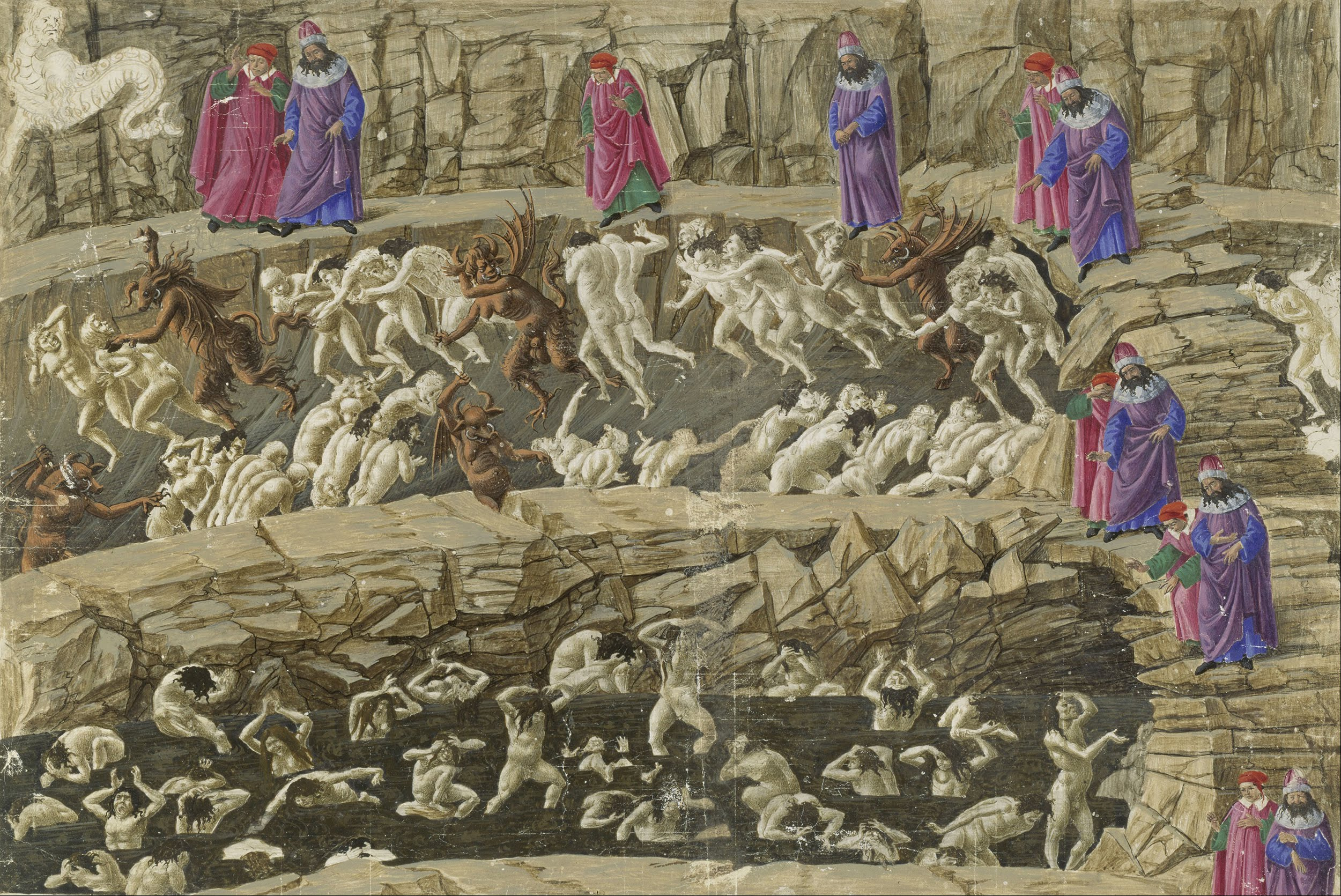 Das Bild beschreibt simultan den 8.Kreis der Hölle - den Höllenkreis des Betrugs. Der schlangenartige Wächter Geryon (li.oben) hat die beiden Jenseitswanderer, Dante und Vergil, zu den Elendsgruben gebracht. Hier sieht man im oberen Graben Kuppler, die von gehörnten Teufeln gepeitscht im Kreis getrieben werden. Jason ist mit einer Krone versehen und büßt dafür, weil er die Liebe von Medea missbraucht hat. In der unteren Elendsgrube sind Schmeichler und Dirnen in einem Sumpf von Kot und büßen ihre ewige Strafe ab. Illustration nach der Dichtung von Dante's Göttlicher Komödie".